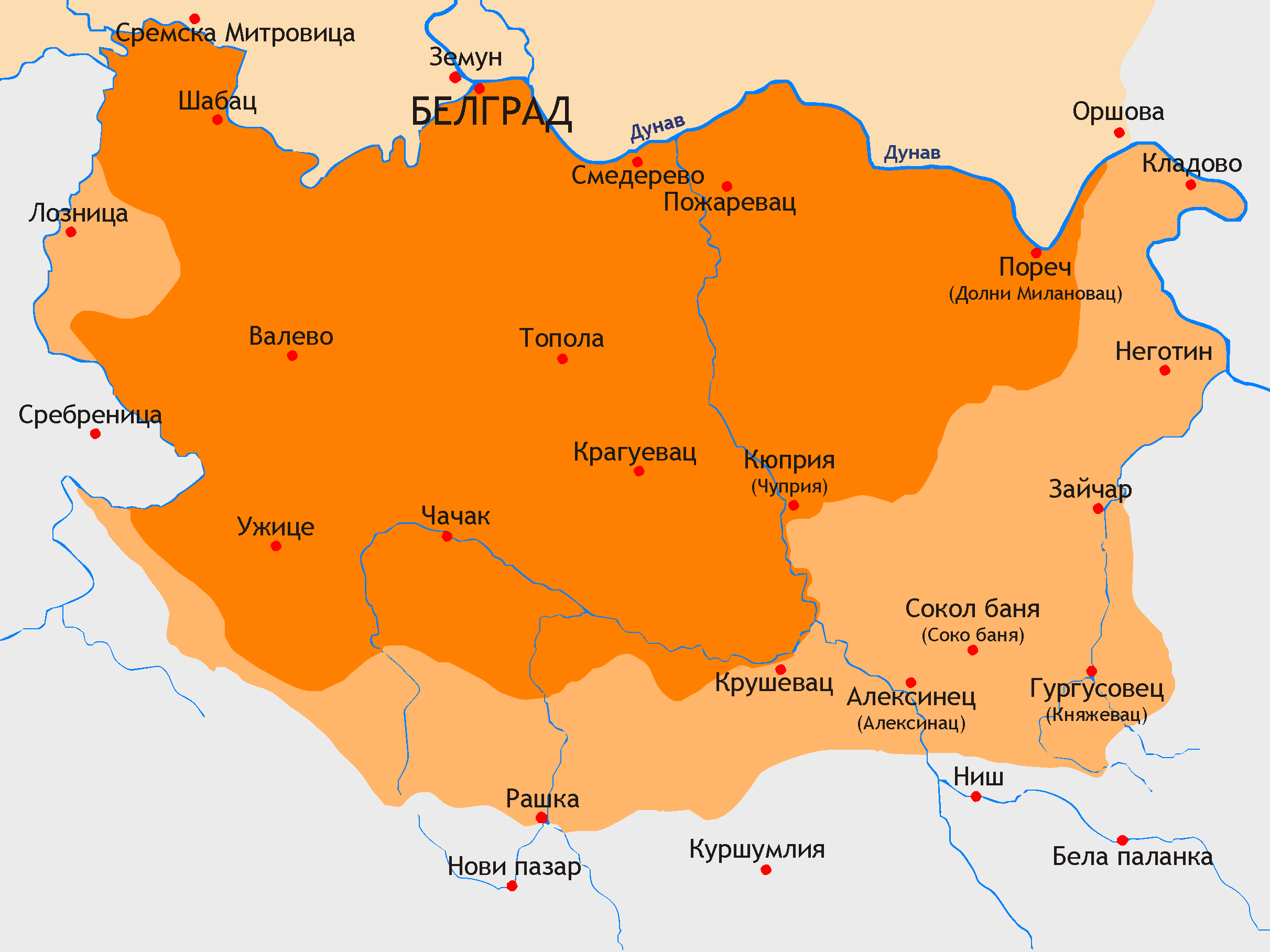 Белградският пашалък с Шумадия и анексираните територии през 1831-1833